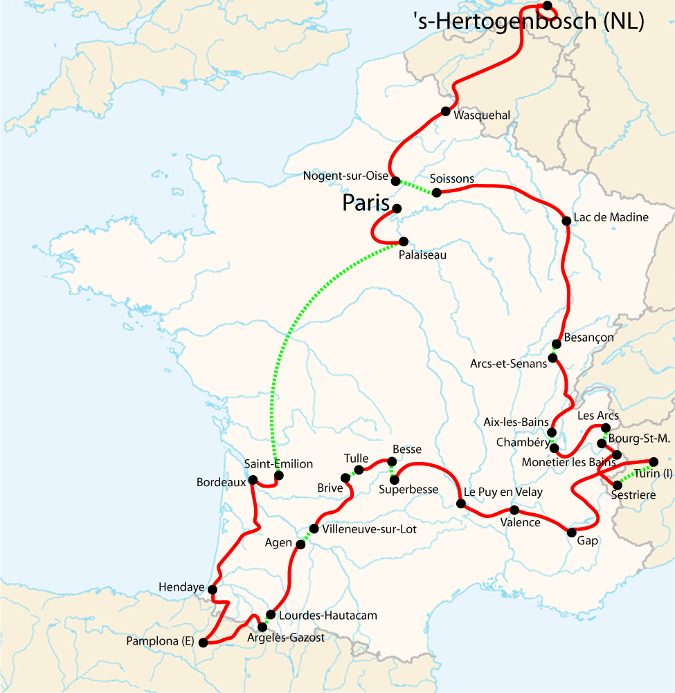 Tour de France 1996